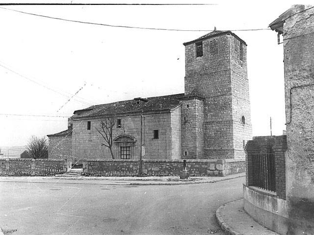 Iglesia de Nuestra Señora de la Concepción - Castronuevo (Valladolid) - Fotografía. Papel 119 x 88 B/N